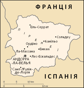 Перекладена з мапи ЦРУ. Копіювання дозволене,вільне за правилами виробника. Перекладене користувачем Vlad. Удосконалене користувачем Kern.